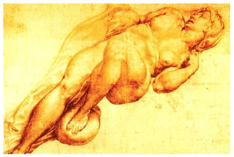 Michelangelok odol-lapitzez egindako biluzi baten marrazkia.